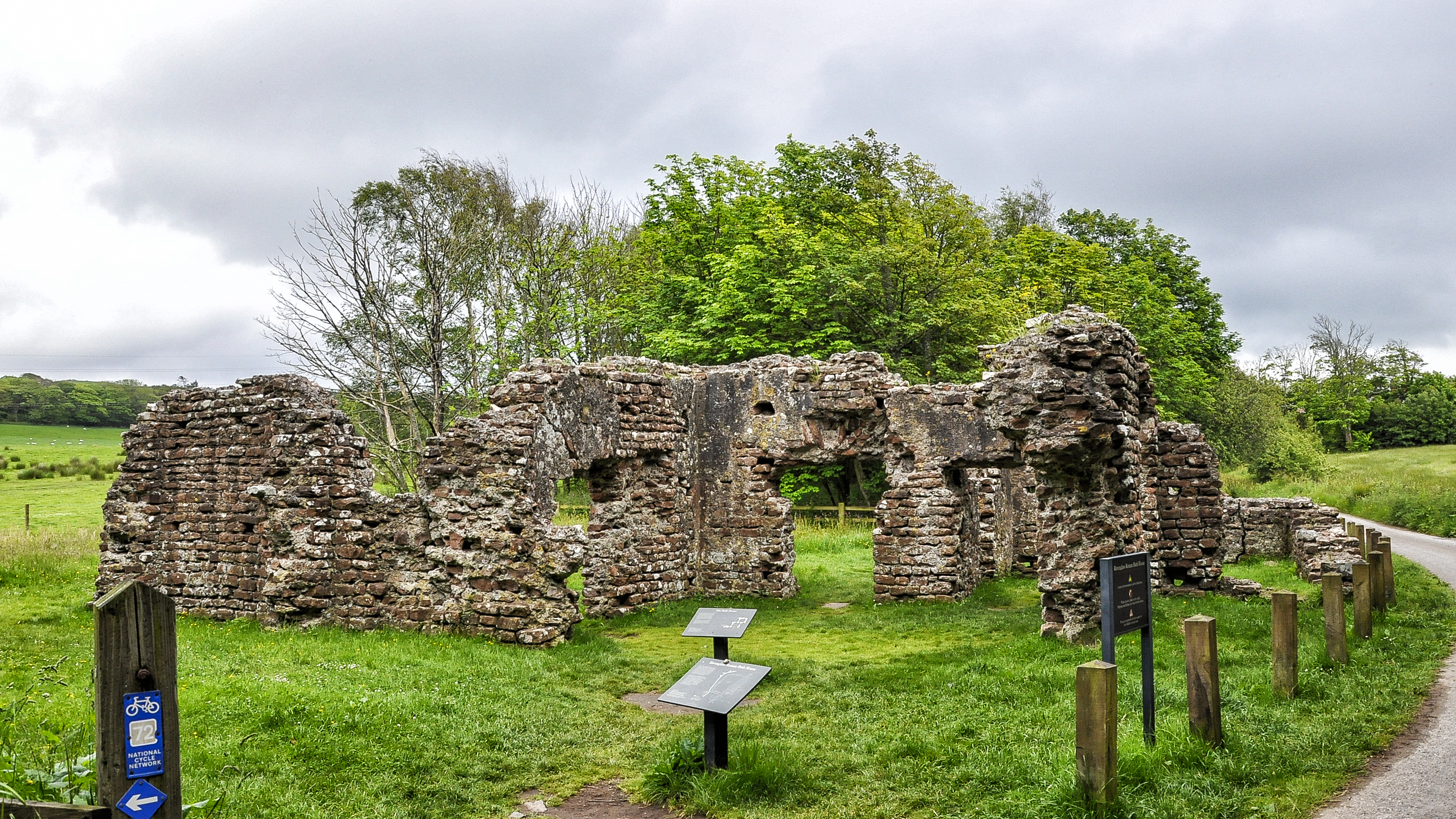 Het Romeins badhuis te Ravenglass, Engeland